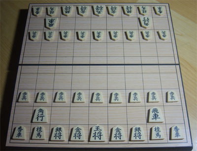 쇼기 배치